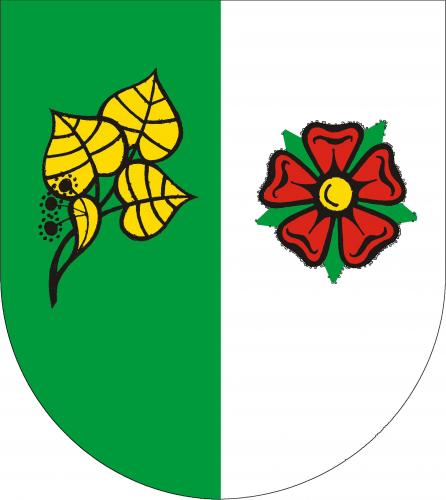 znak,Želeč , okres Tábor